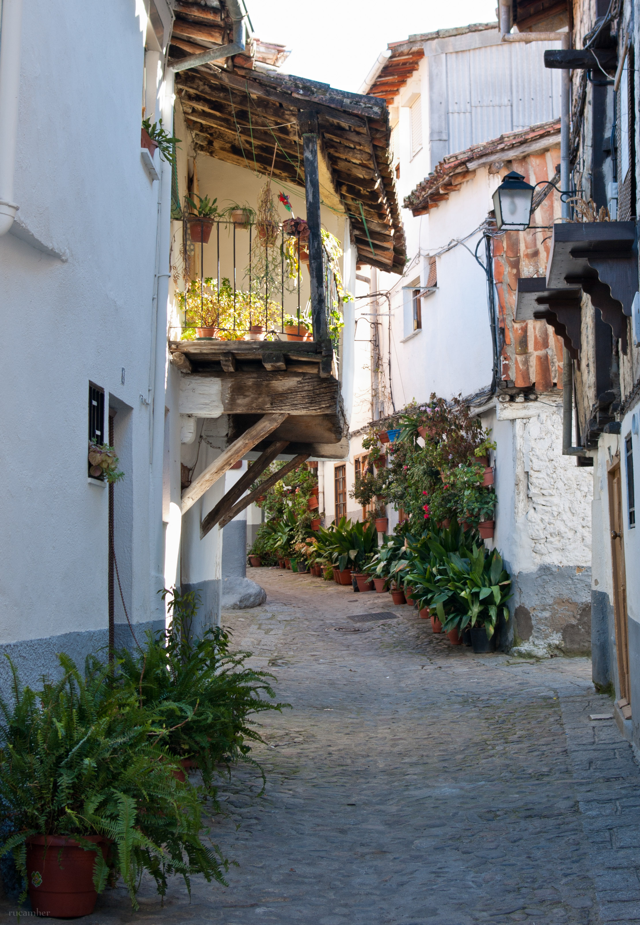 Hervas, En el siglo XV se estableció en la población, una pequeña comunidad hebrea que se asentó desde las faldas del castillo hasta la vertiente del río Ambroz. Esta comunidad estaba, vinculada a la Aljama de Bejar. Los judíos ejercían el préstamo al interés y trabajaban en oficios artesanales. Eran tejedores, lenceros, cardadores, manteleros y pañeros. También hubo un médico, Rabí Simuel, que ejerció como notario y arrendador del obispo de Plasencia y Coria, y construyo la Sinagoga en la calle Rabilero.